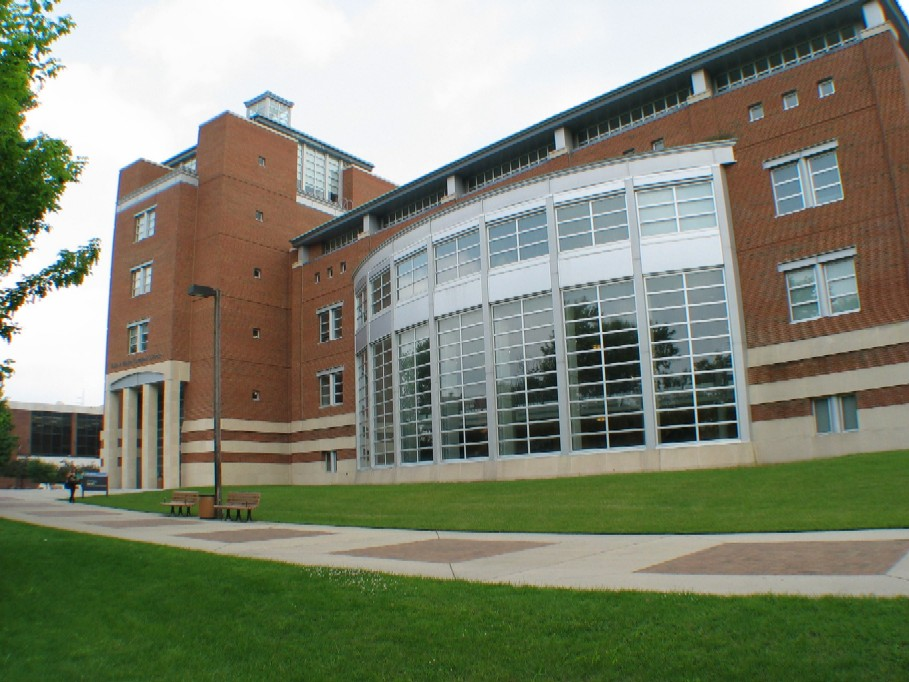 Campbell Kutuphanesi